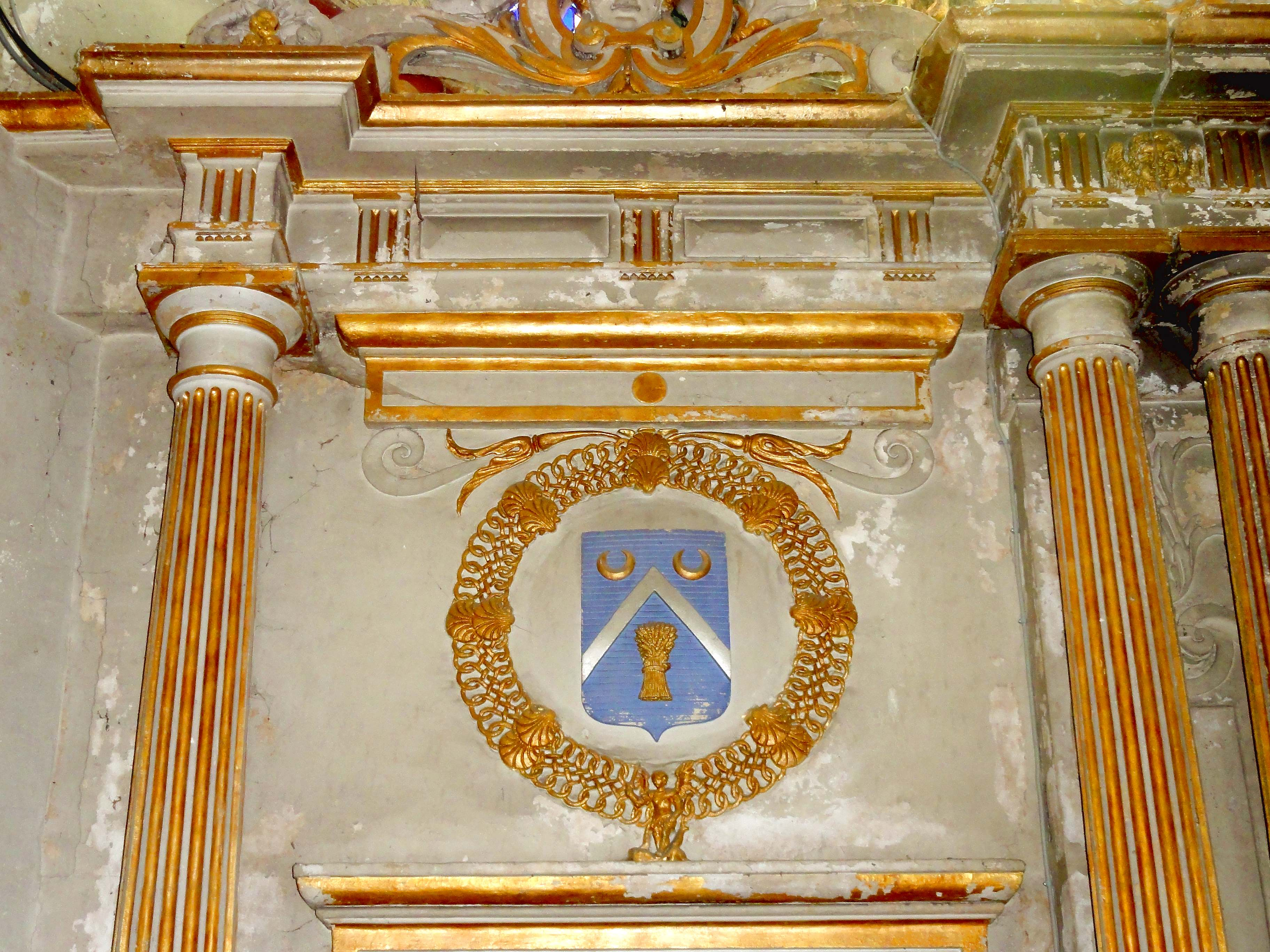 Retable en pierre de 1561 (voir titre).